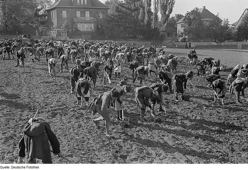 Original image description from the Deutsche Fotothek Dresden. Hungernde Bevölkerung beim "Kartoffelstoppeln" unmittelbar nach Beendigung der Ernte am Dresdner Stadtrand